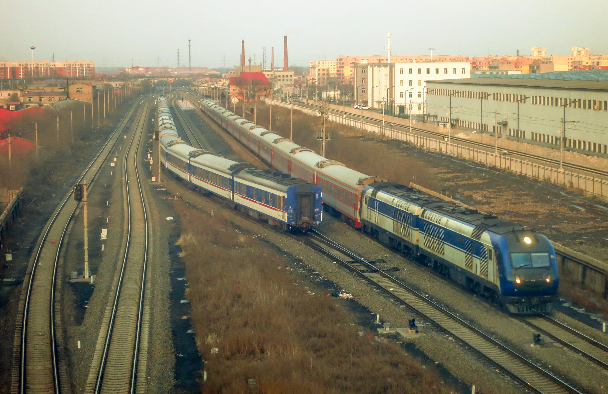 photo by Xundaogong 巡道工出品